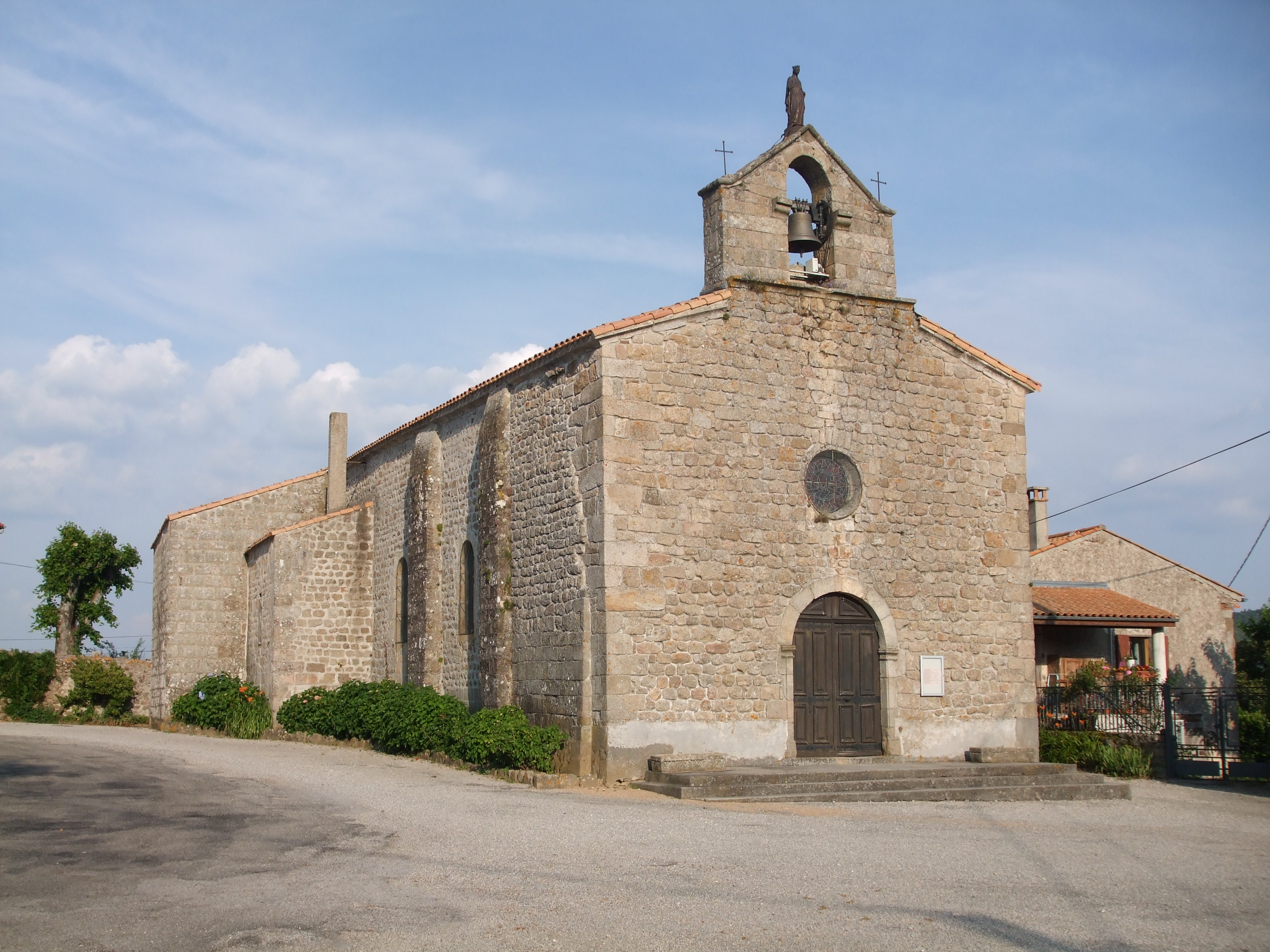 église Notre Dame de l'Assomption